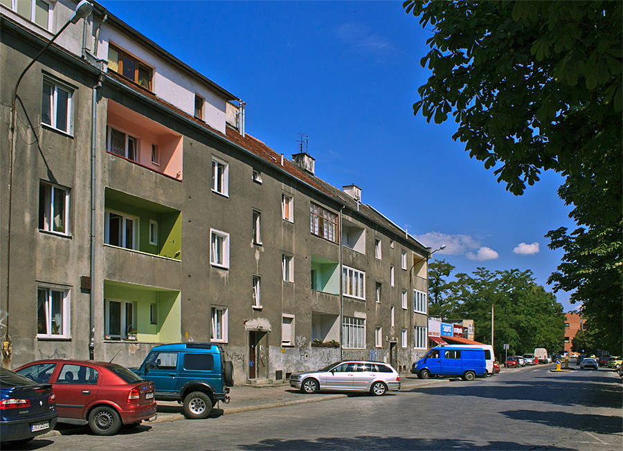 Dawny dom mieszkalny fundacji Friedmanna we Wrocławiu